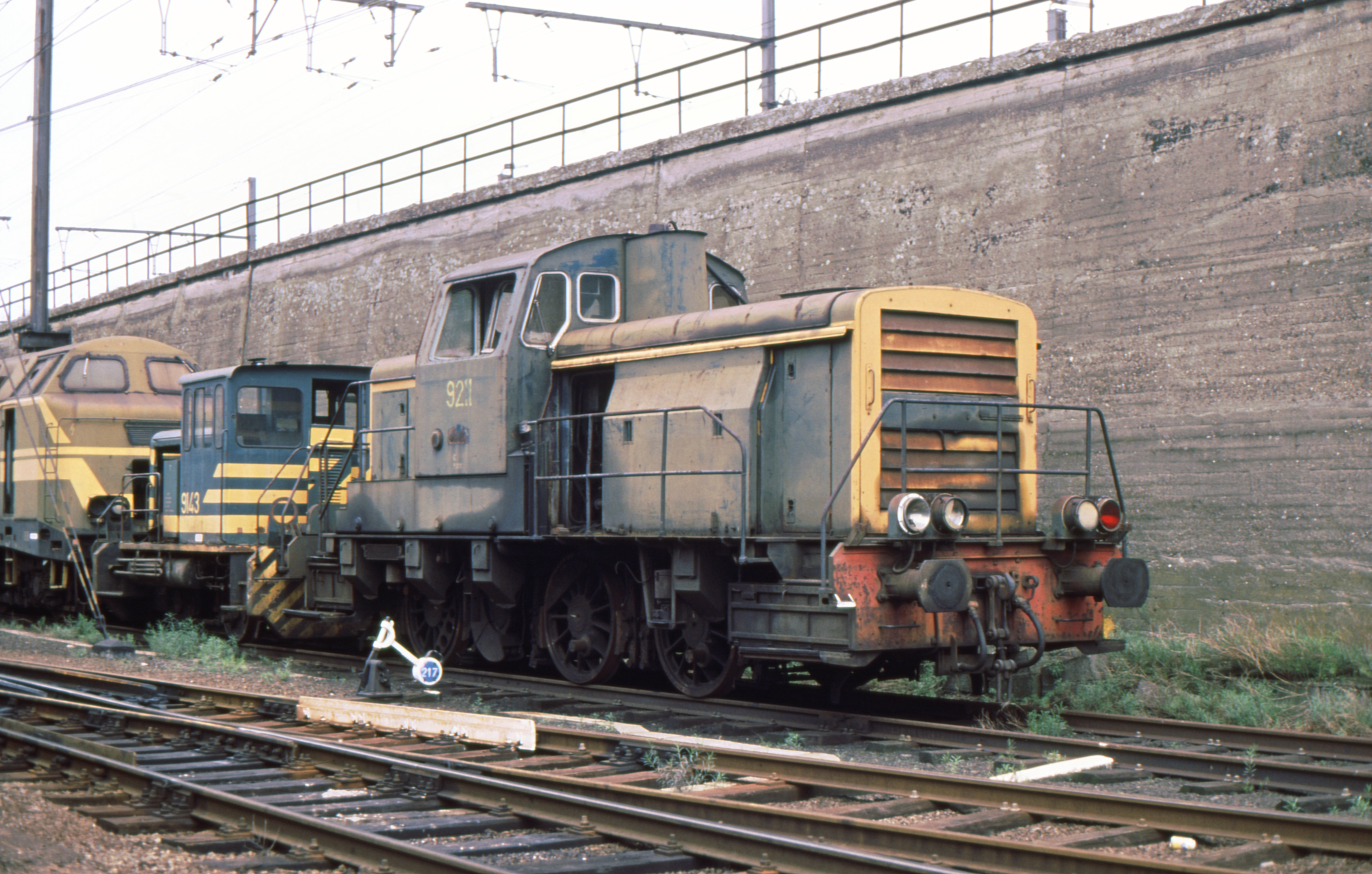 B - NMBS - 2.2. 9211 - 1998-04-26 - Kinkempois